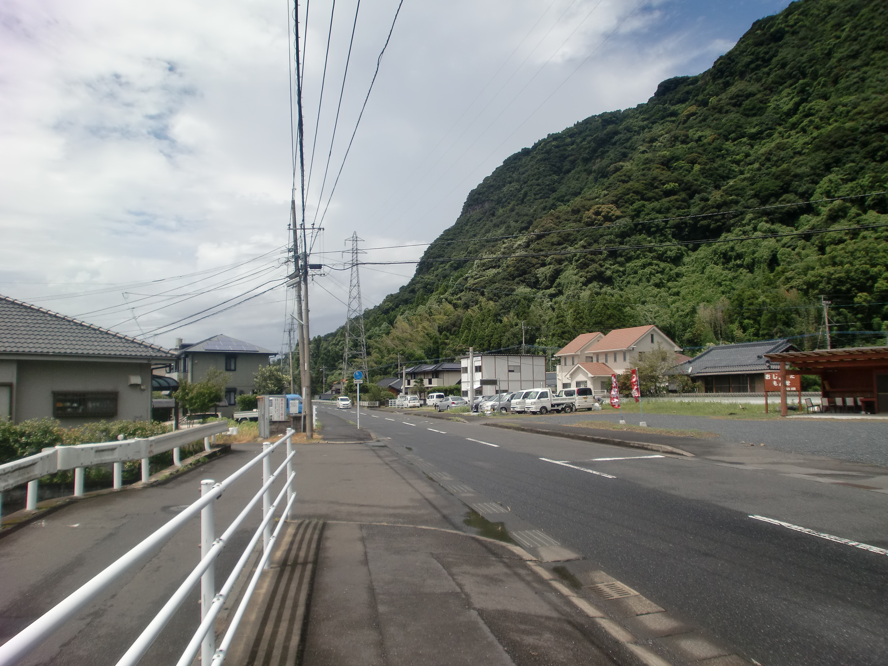 大隅線の敷根駅跡を望む。線路跡を通る道路は鹿児島県道472号日当山敷根線である。